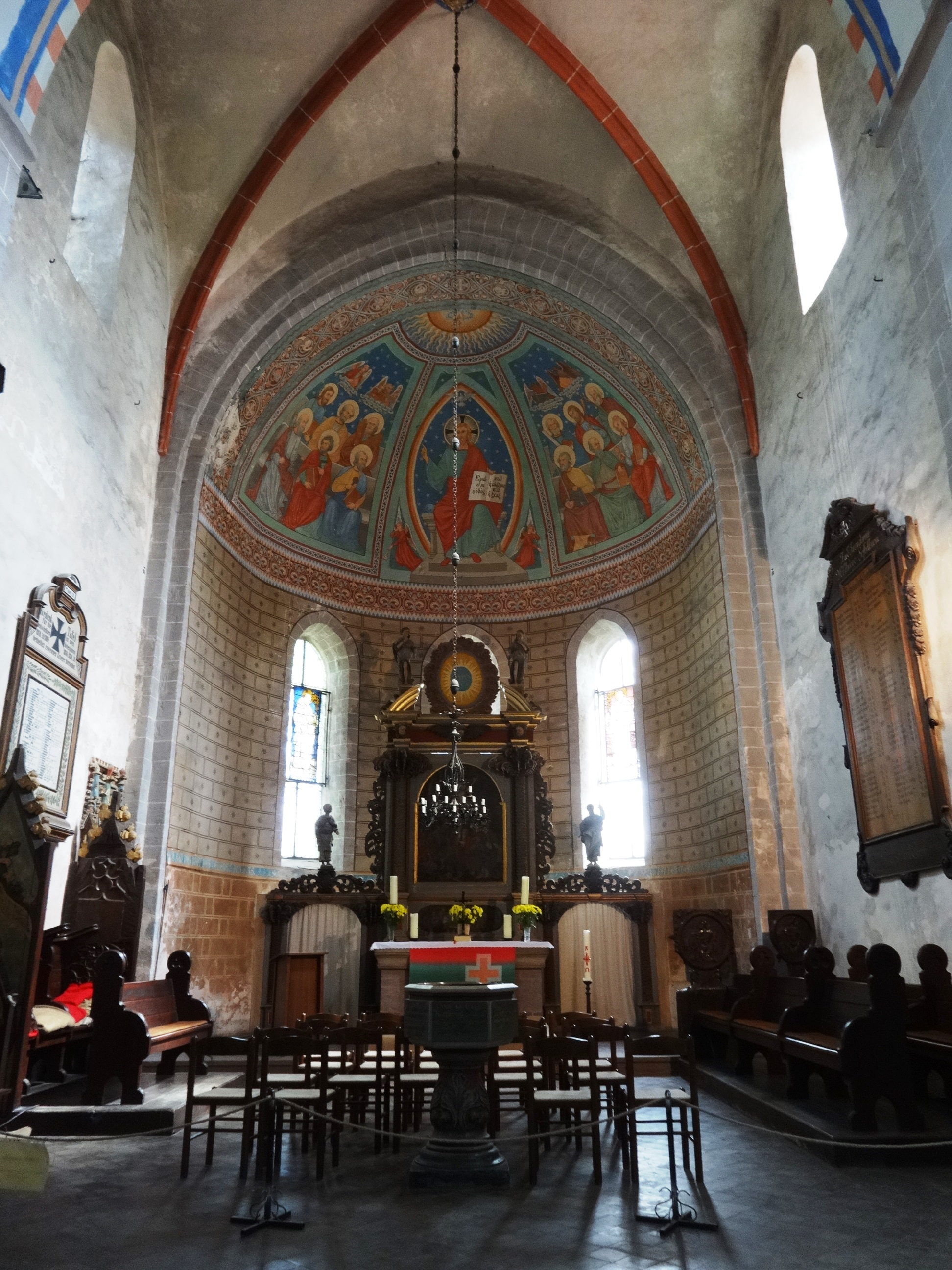 Die Klosterkirche St. Maria entstand im 12. Jahrhundert als Teil eines Zisterzienserklosters. Sie befindet sich in Jüterbog im Landkreis Teltow-Fläming in Brandenburg.